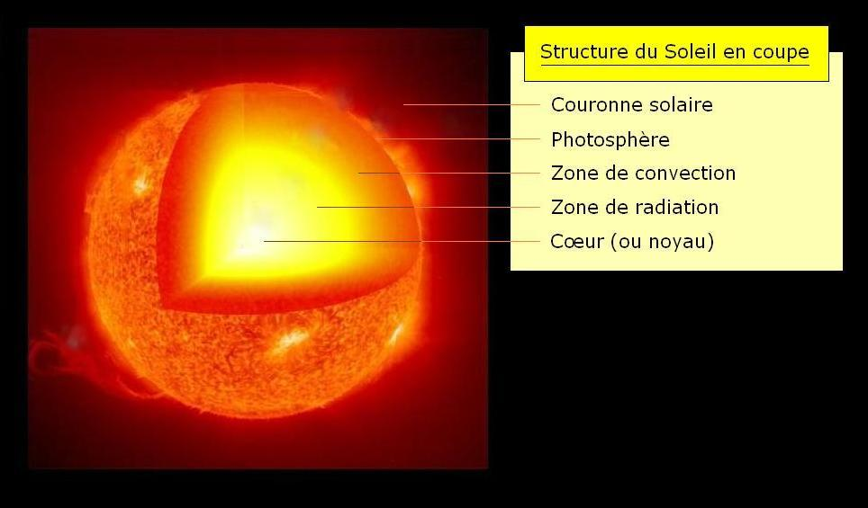 Description : Représentation schématique du Soleil en coupe Auteur : Propre travail sur une coupe issue de la Wikipedia anglophone ([1]), dans le domaine public Licence : Identique à l'originale (domaine public)